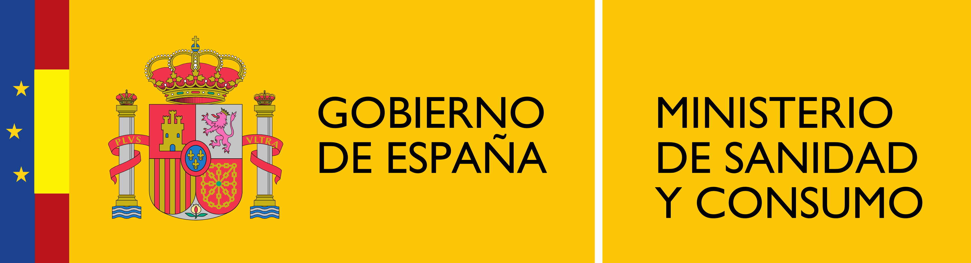 Logotipo del Ministerio de Sanidad y Consumo